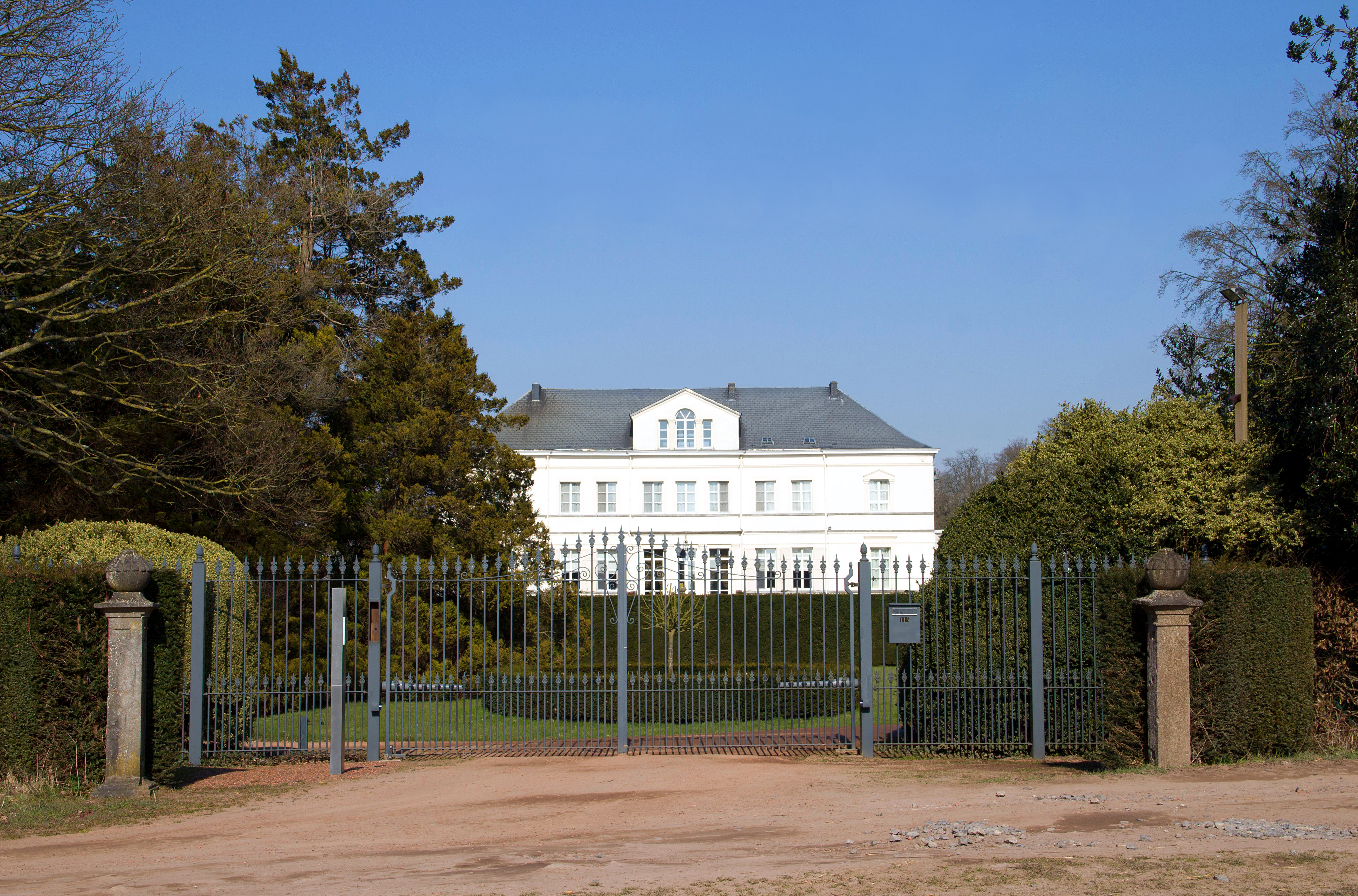 Havré (Belgique), rue de Beaulieu, 115-119. - Château de Beaulieu (XIXe siècle).